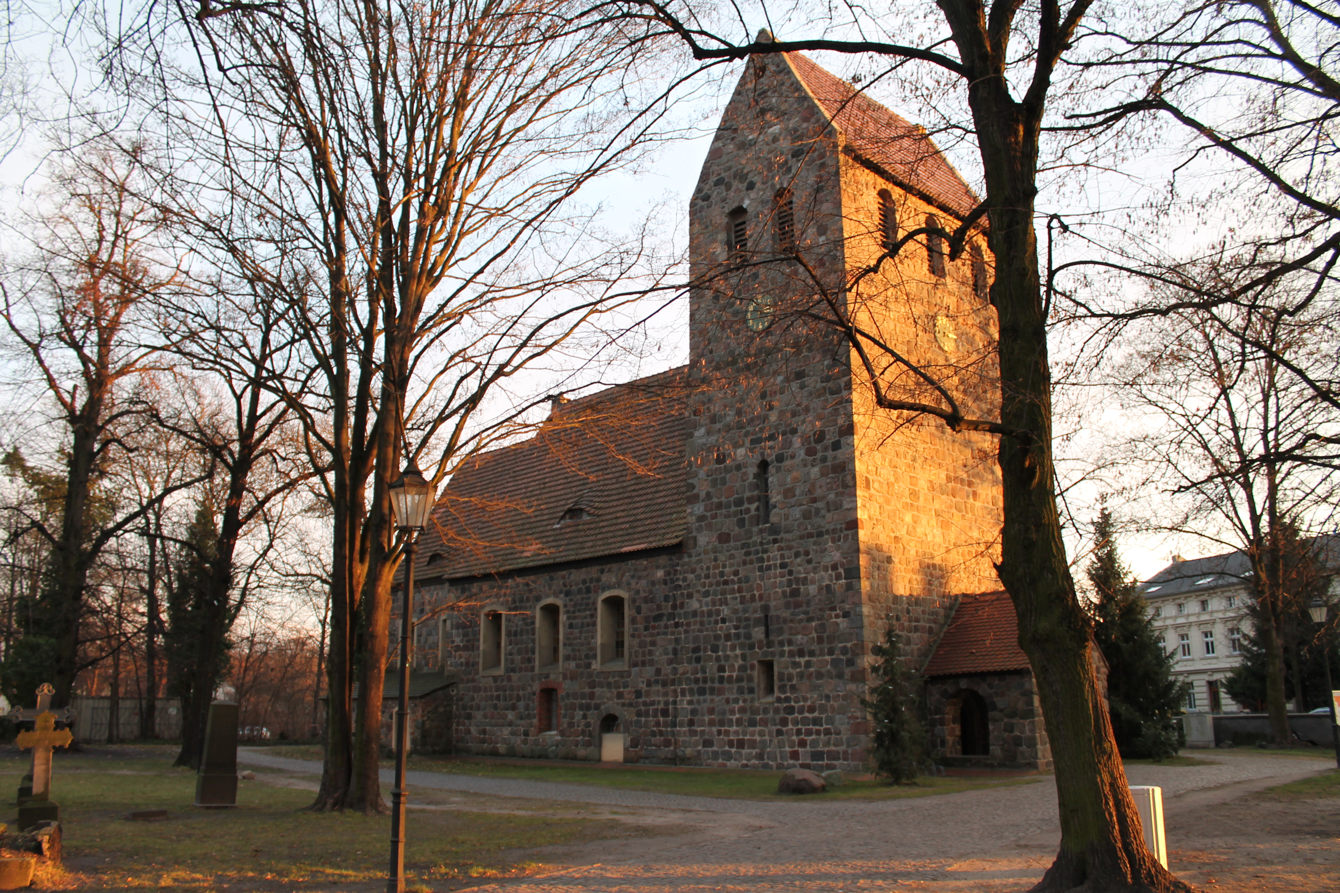 Dorfkirche Marienfelde Nordseite